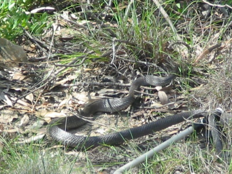 Pseudonaja, un des serpents les plus dangereux au monde